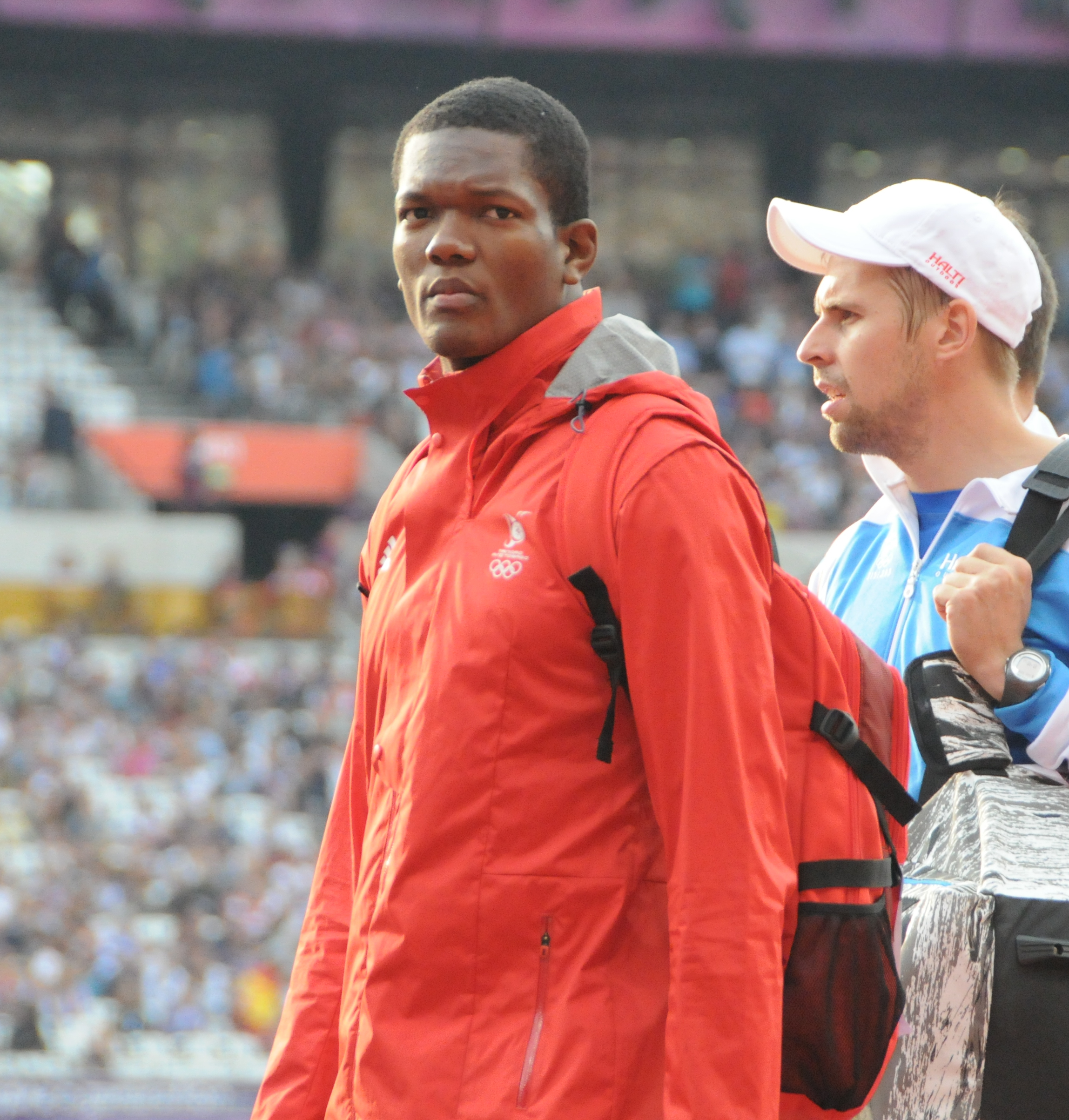 Keshorn Walcott (en rouge) médaillé olympique du lancer de Javelot